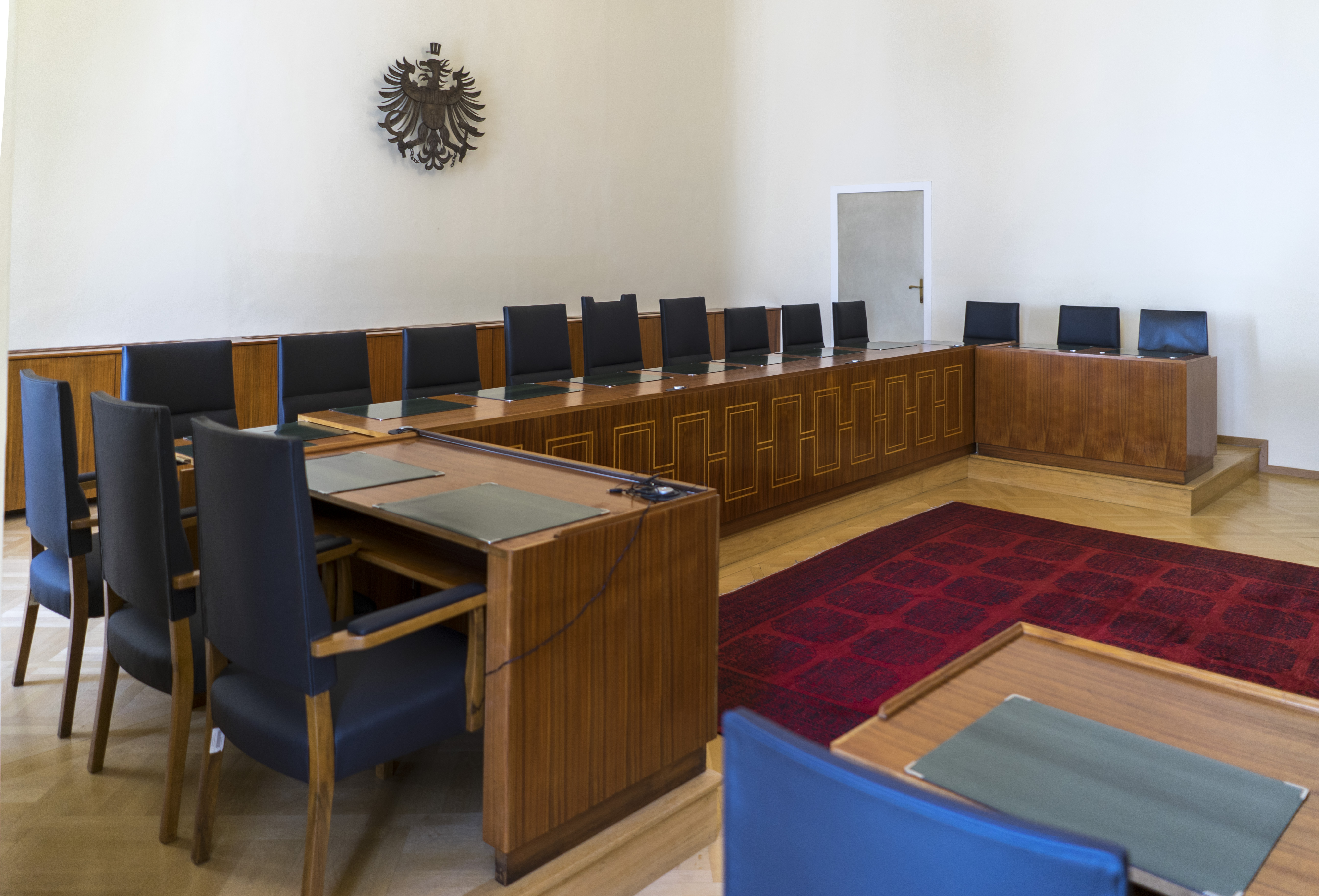 Ehem. Böhmische Hofkanzlei, jetzt Verwaltungsgerichtshof. Verhandlungssaal. Inneneinrichtung Erich Boltenstern (1946/1947)